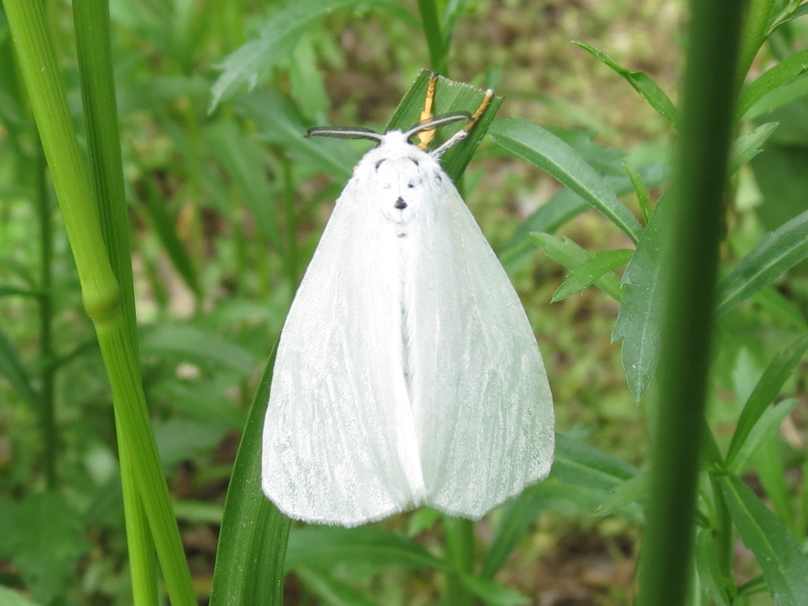 イネ科の雑草の葉にしがみつくキアシドクガの雌 Ivela auripes ImagoClingingOnGrass♀01と同じ個体